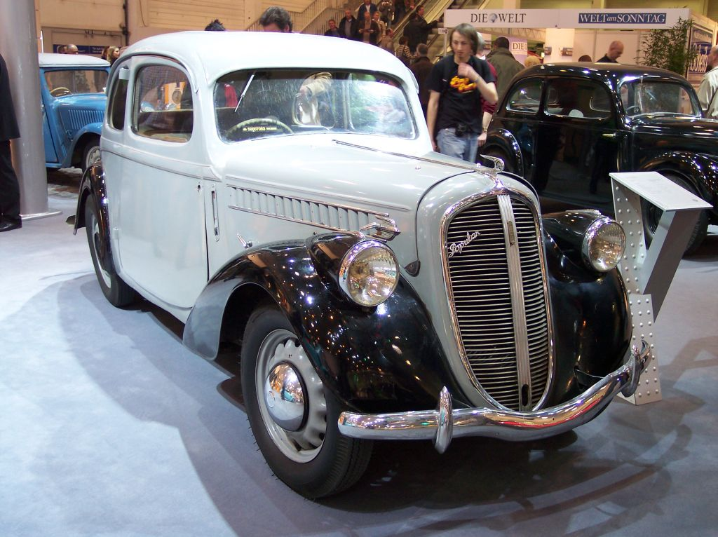 Škoda Popular OHV (type 912) (Techno Classica Essen 2007)